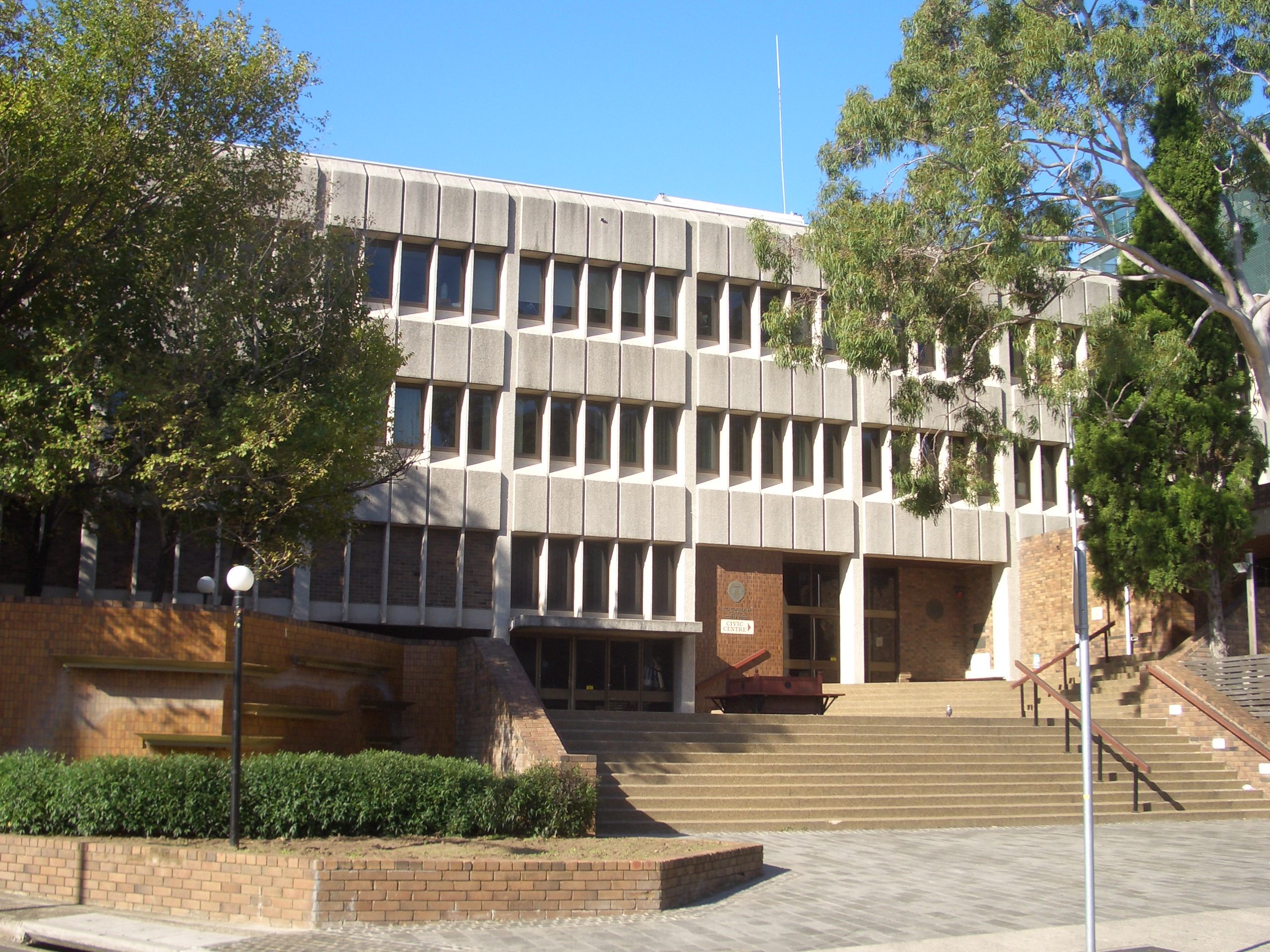 Kogarah_Council